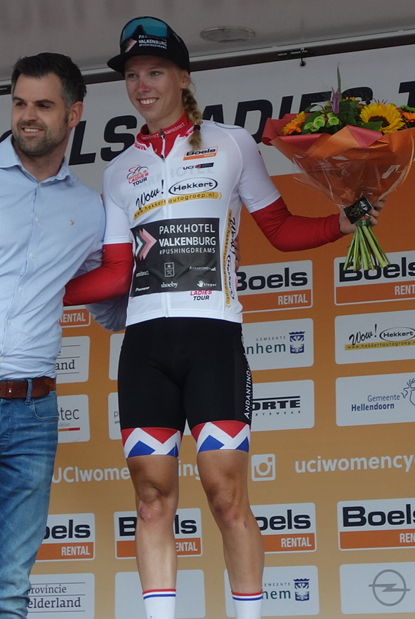 Lorena Wiebes won de eerste etappe in Weert en kreeg de witte jongerentrui in de Boels Ladies Tour 2019